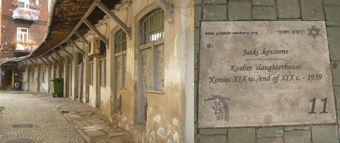 Radomsko. Otwarte Muzeum Żydowskie 11